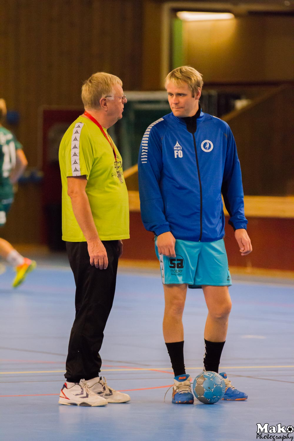 Div 3 VGL HP Tibro - HF Team Kropps